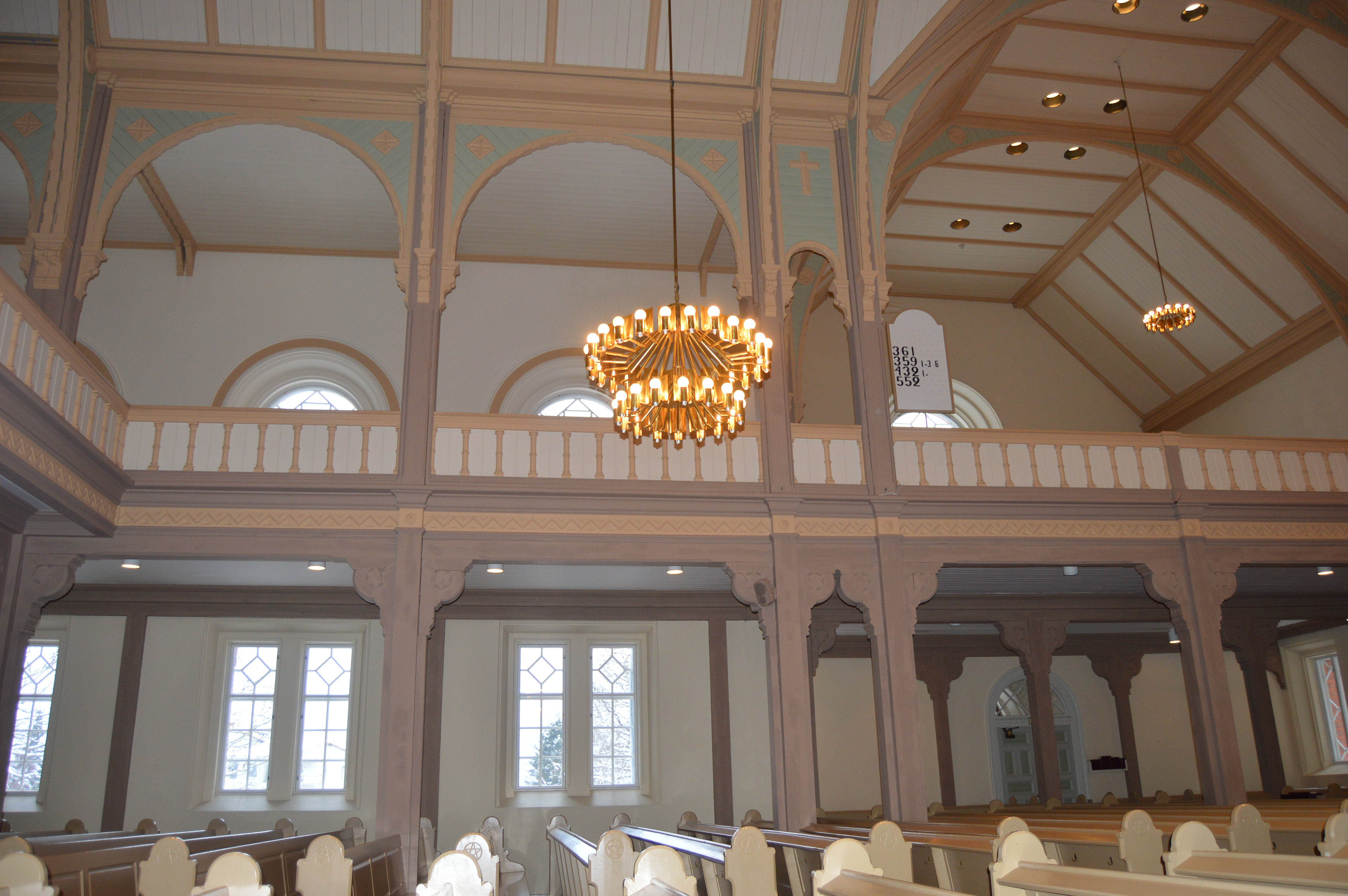 Kiteen kirkko sisältä